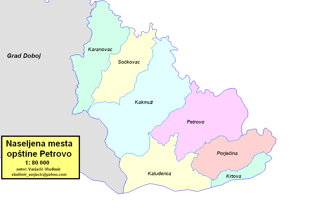 Opština Petrovo